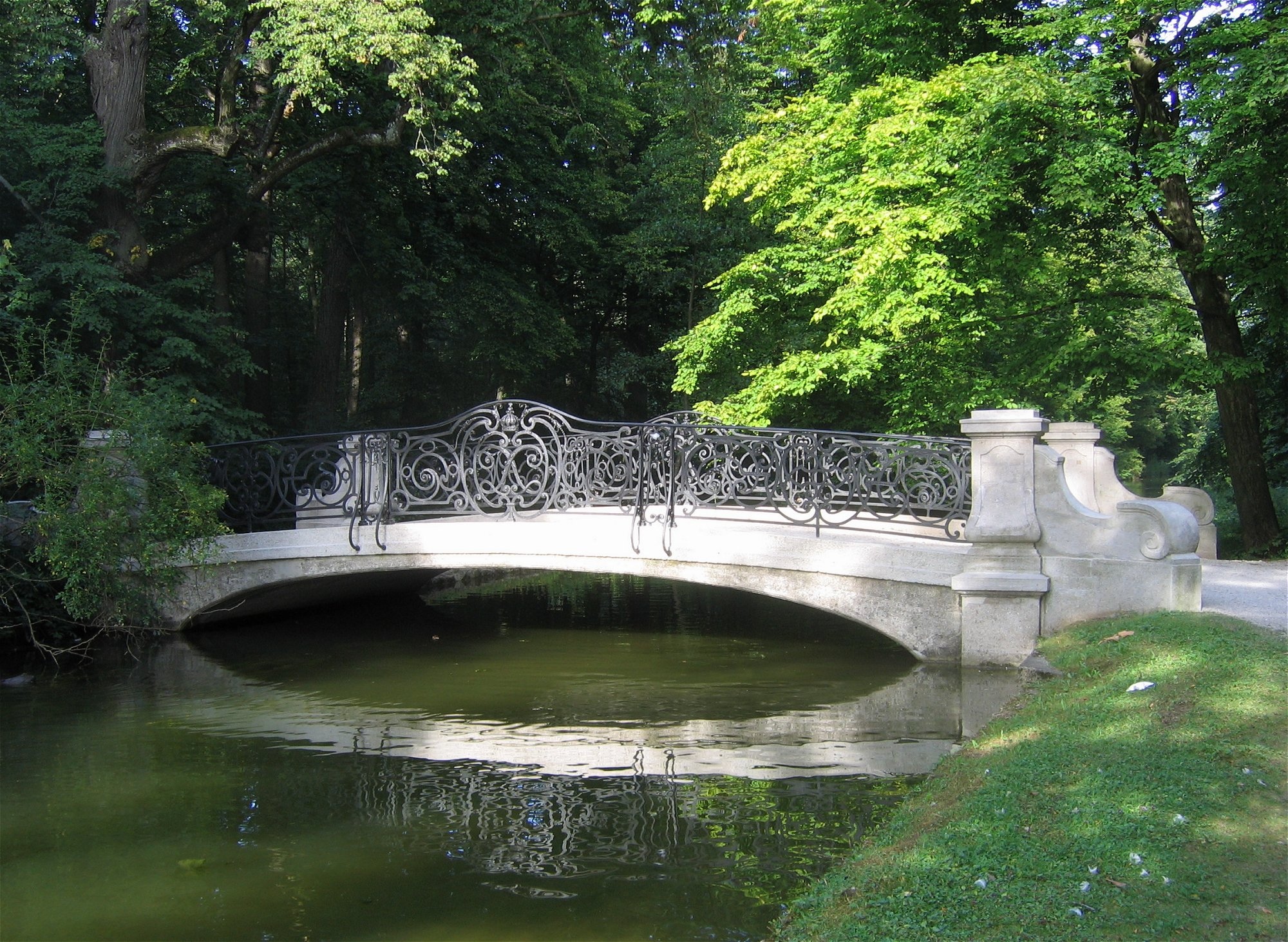 Schlosspark Nymphenburg, Brücke am Großen See